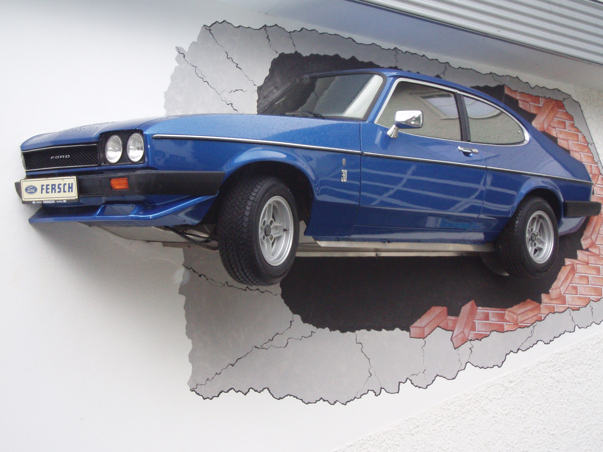 Autohaus Fersch, Bad Hindelang, Wandgestaltung